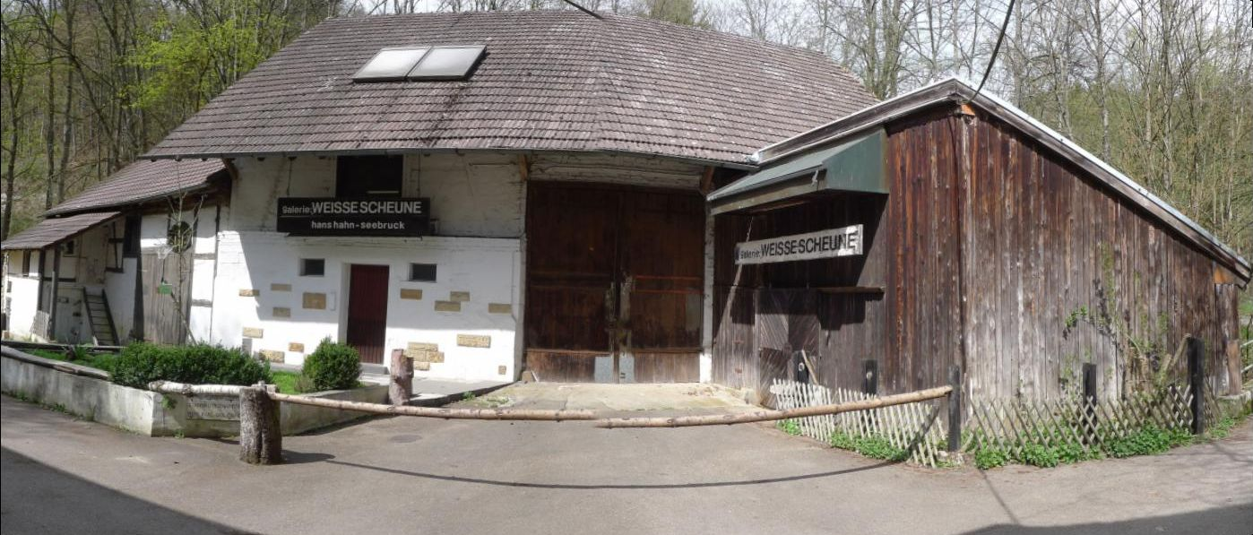 De Weisse Scheune van Hans Hahn-Seebruck, naast de Seebruckenmühle in het Siebenmühlental (Stuttgart)